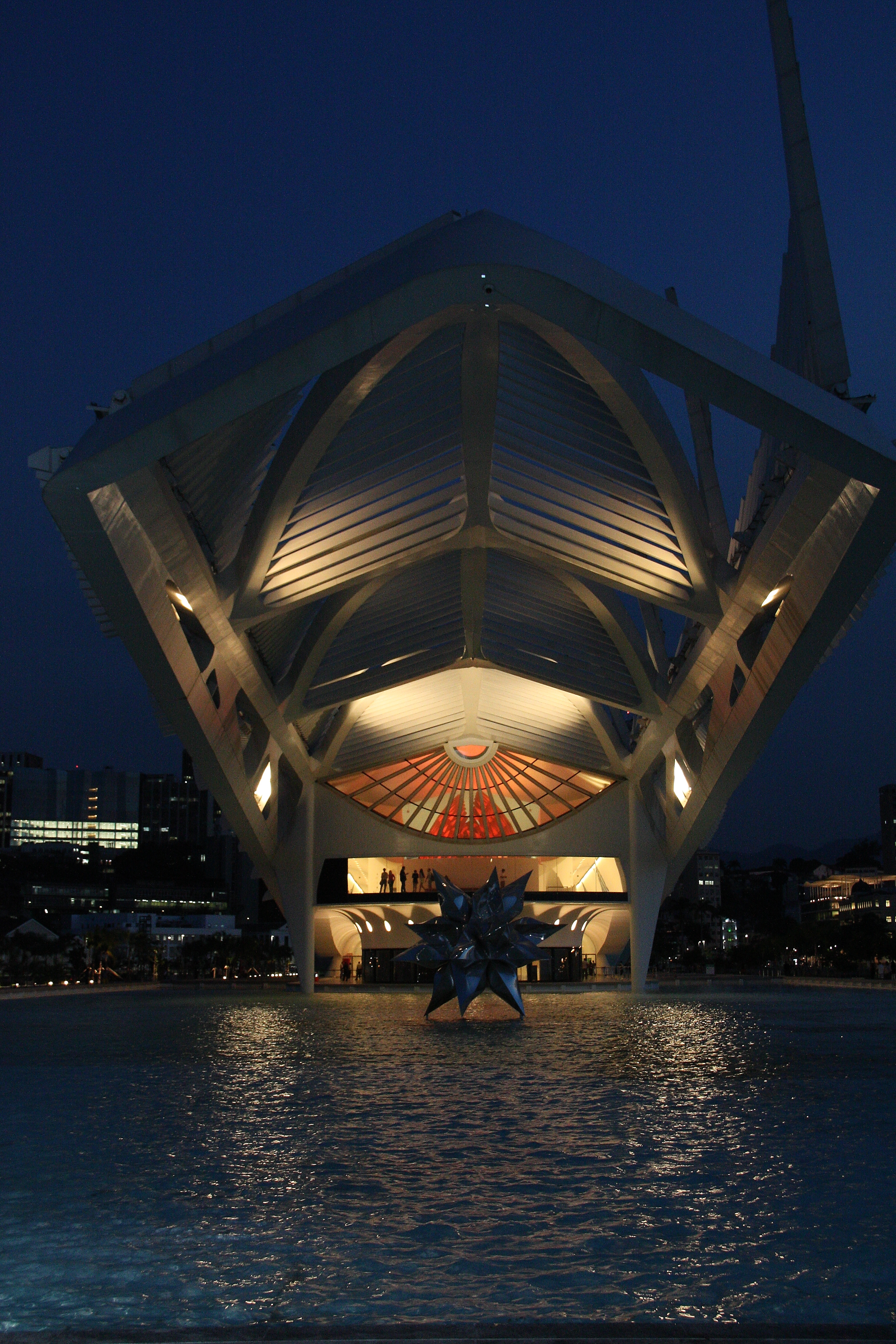 Museu do amanhã - Rio de janeiro Visão No Entardecer